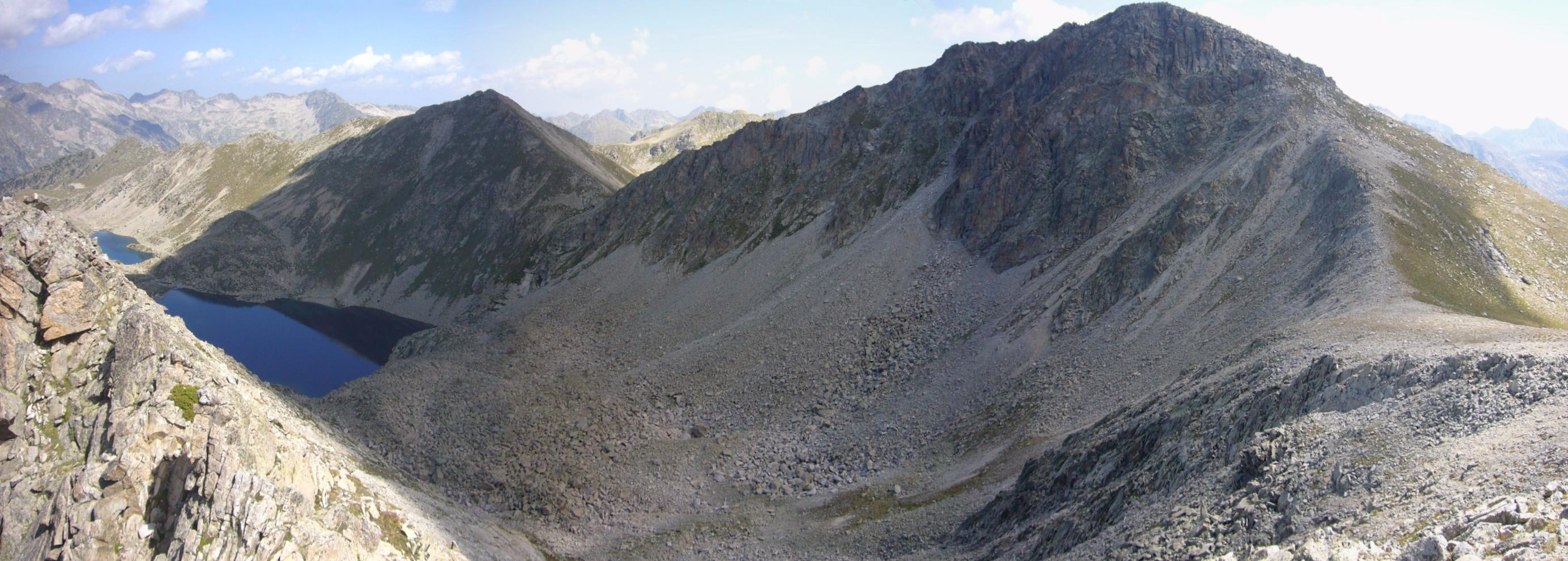 Estanys Xic i Major de Morrano, i Pics de Dellui i de Nariolo; la Vall de Boí, Alta Ribagorça, Catalunya